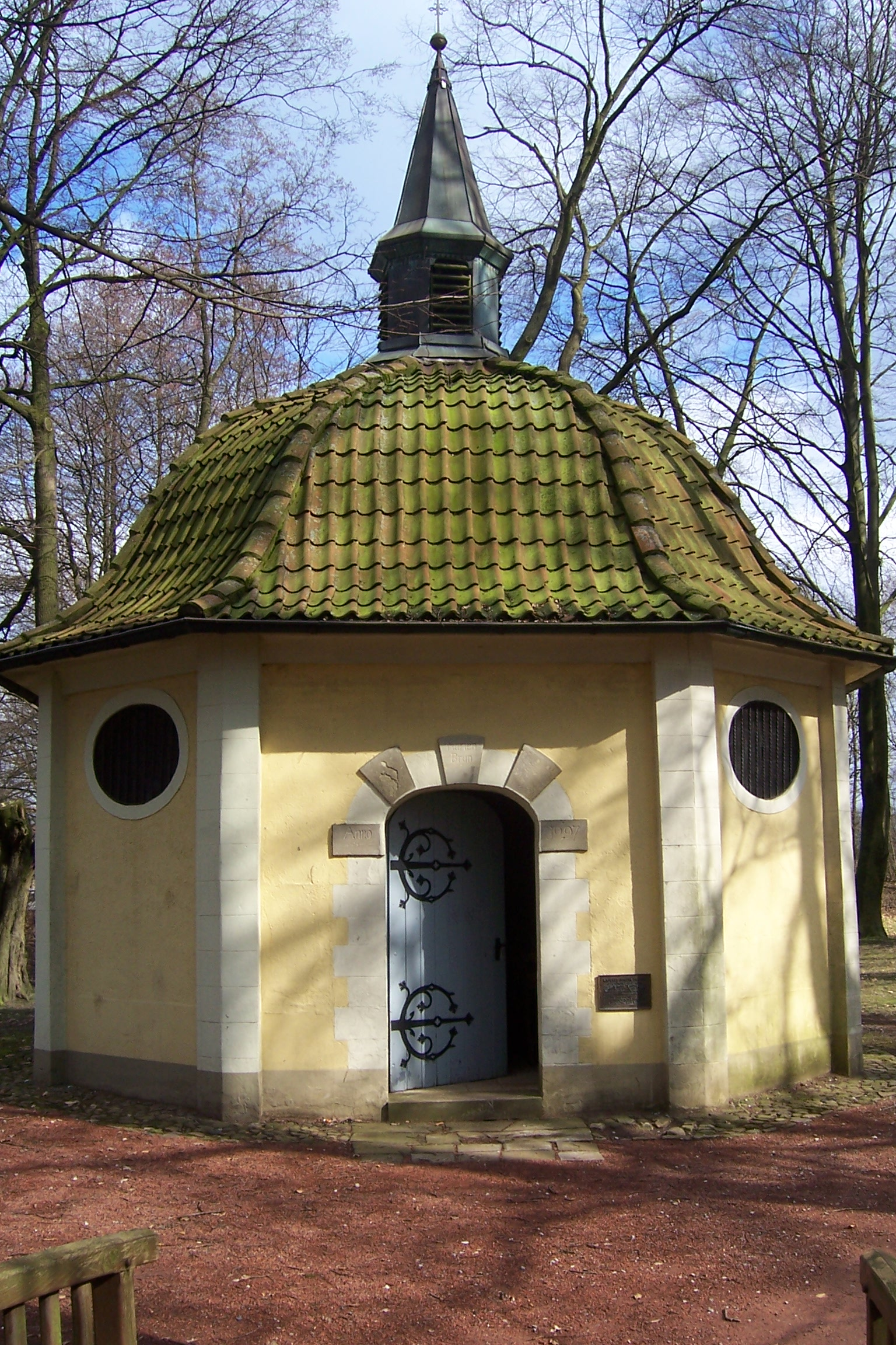 Kapelle Maria-Brunn Vreden an der Ottensteiner Straße.